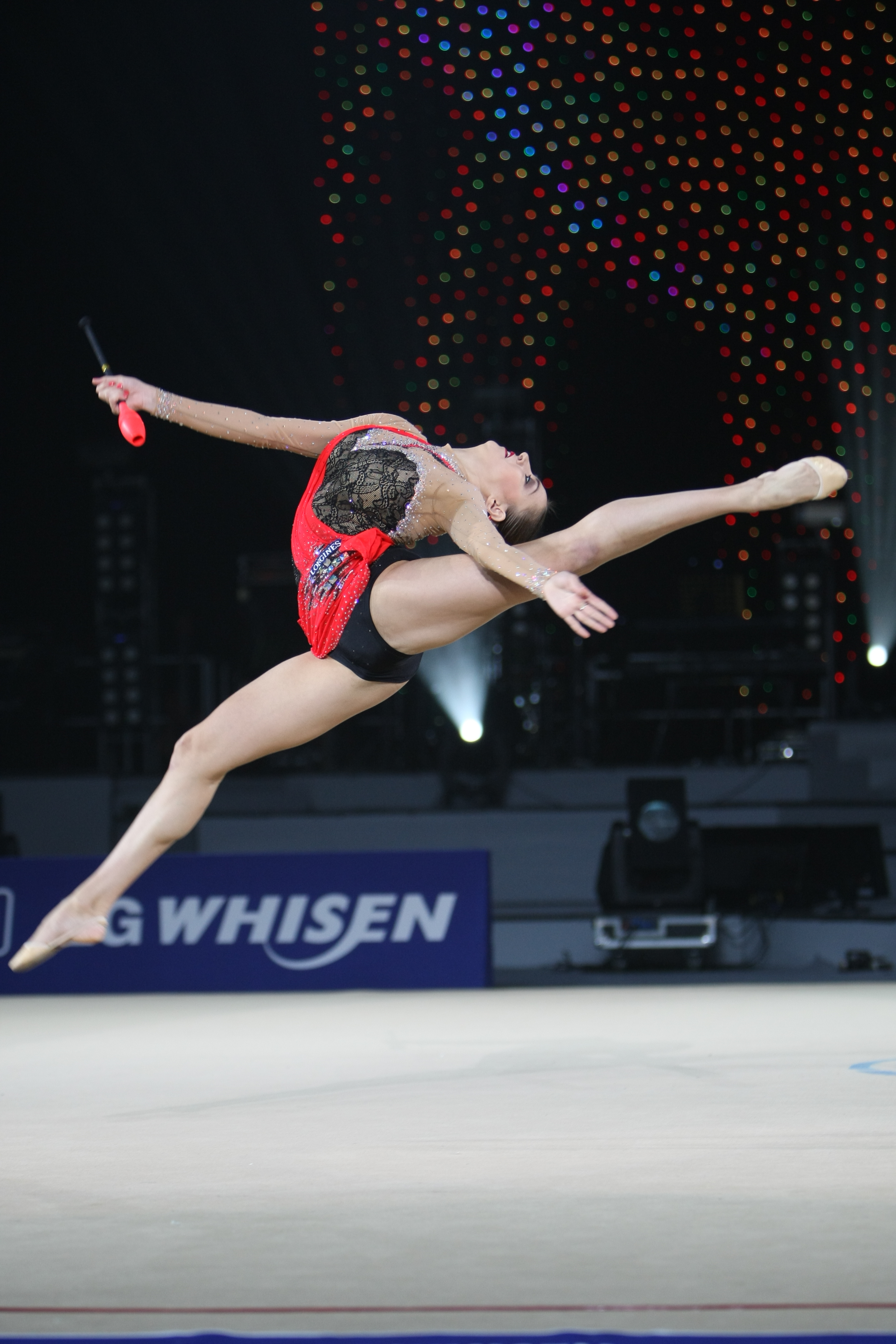 LG전자가 11일(土, 오후 3시), 12일(日, 오후 2시) 양일간 고려대학교 화정체육관 특설무대에서 국내 최초 리듬체조 갈라쇼인 ‘LG WHISEN Rhythmic All Stars 2011’ 행사를 개최했다. 사진은 11일 고려대학교 화정체육관 특설무대에서 열린 ‘LG WHISEN Rhythmic All Stars 2011’ 행사에서 LG ‘휘센’ 광고모델인 손연재(18세, 세종고) 선수를 비롯해 국내외 전•현역 리듬체조 스타들이 총출동해 멋진 리듬체조를 보여줬다.